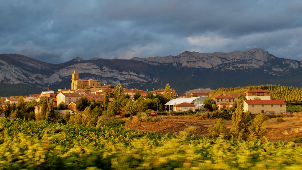 Navaridas, Rioja Region, Spain (by @taniazapata)